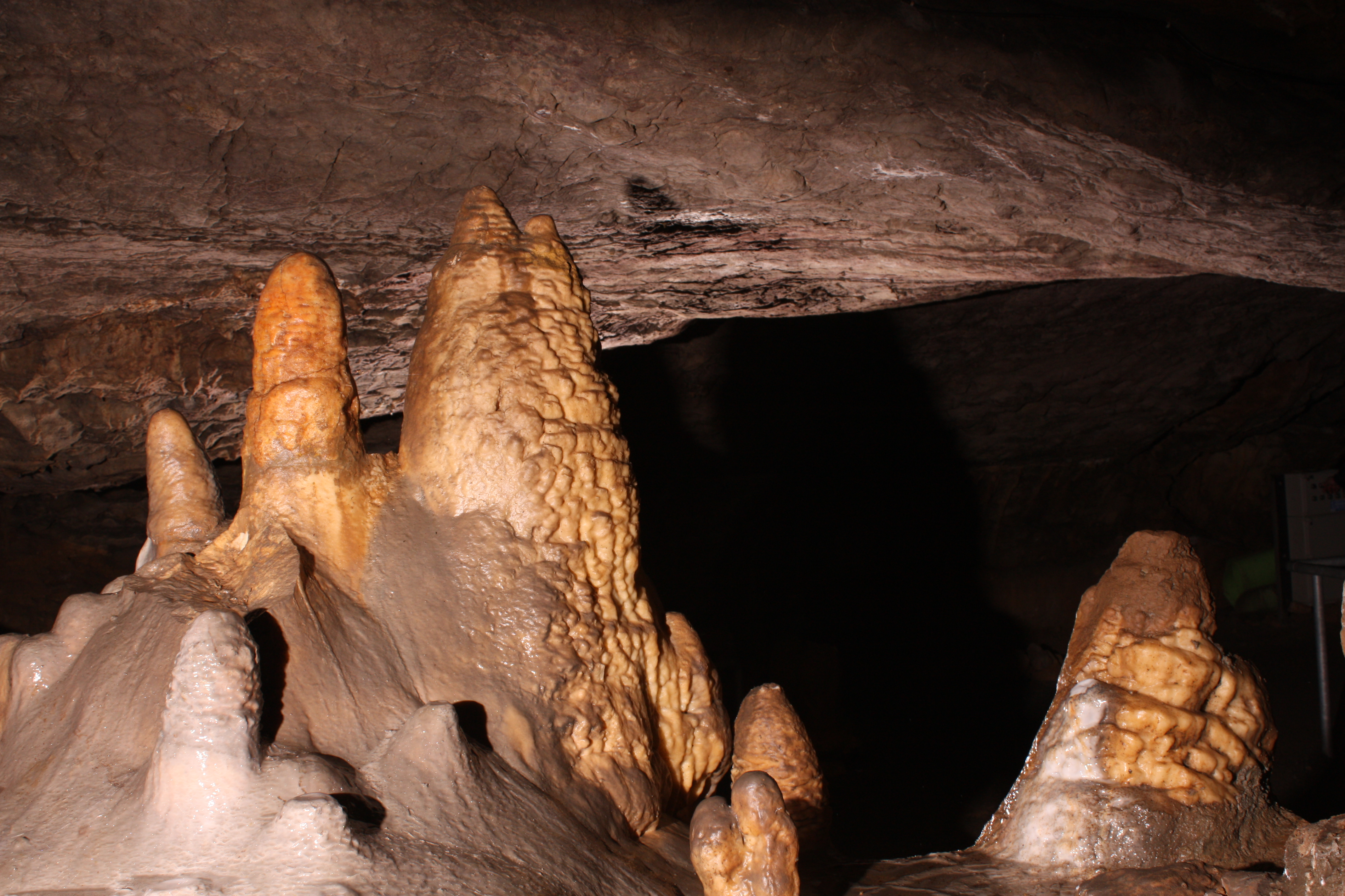 Heinrichshöhle, Tropfsteine im Besucherteil.